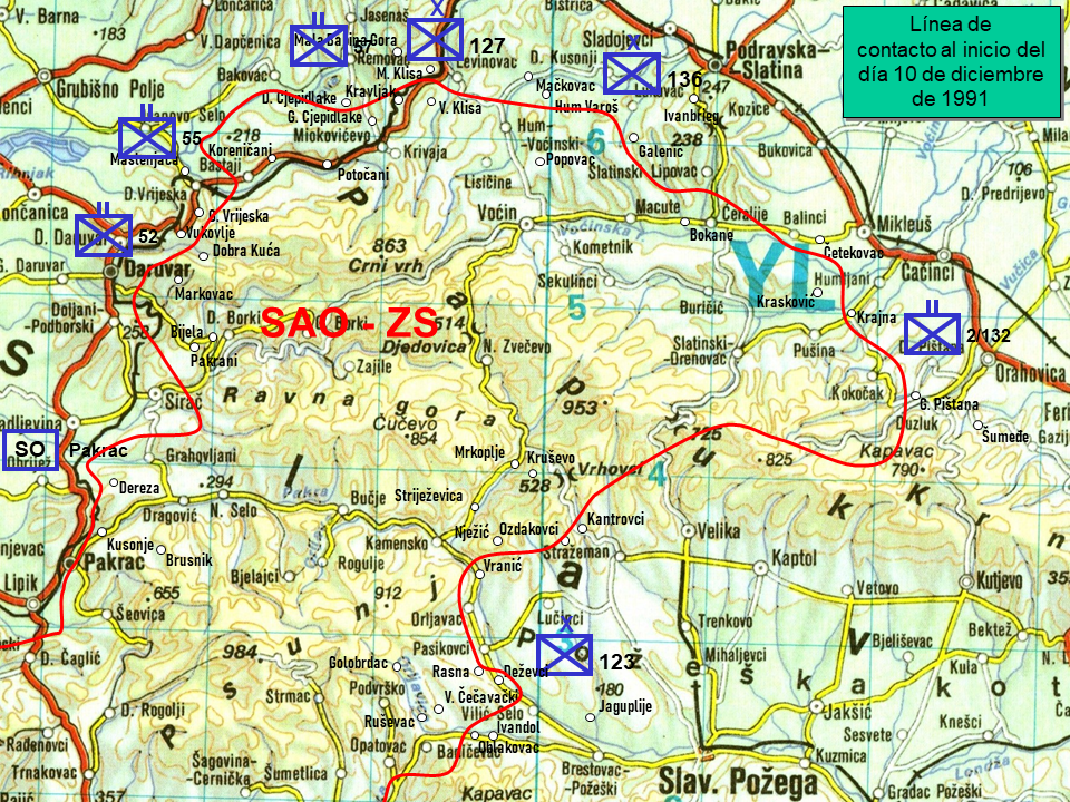 Eslavonia Occidental. Línea de contacto. 10 de diciembre 1991. Confeccionado sobre la base de Martinić Jerčić, Natko (11 de diciembre de 2014). «Oslobodilačke Operacije Hrvatskih Snaga u Zapadnoj Slavoniji u Jesen i Zimu 1991./1992. godine» [Operaciones de liberación de las fuerzas croatas en Eslavonia occidental en otoño e invierno 1991/1992.]. Tesis Doctoral (en croata) (Zagreb: University of Zagreb. Department of Croatian Studies.). Consultado el 14 de marzo de 2020.